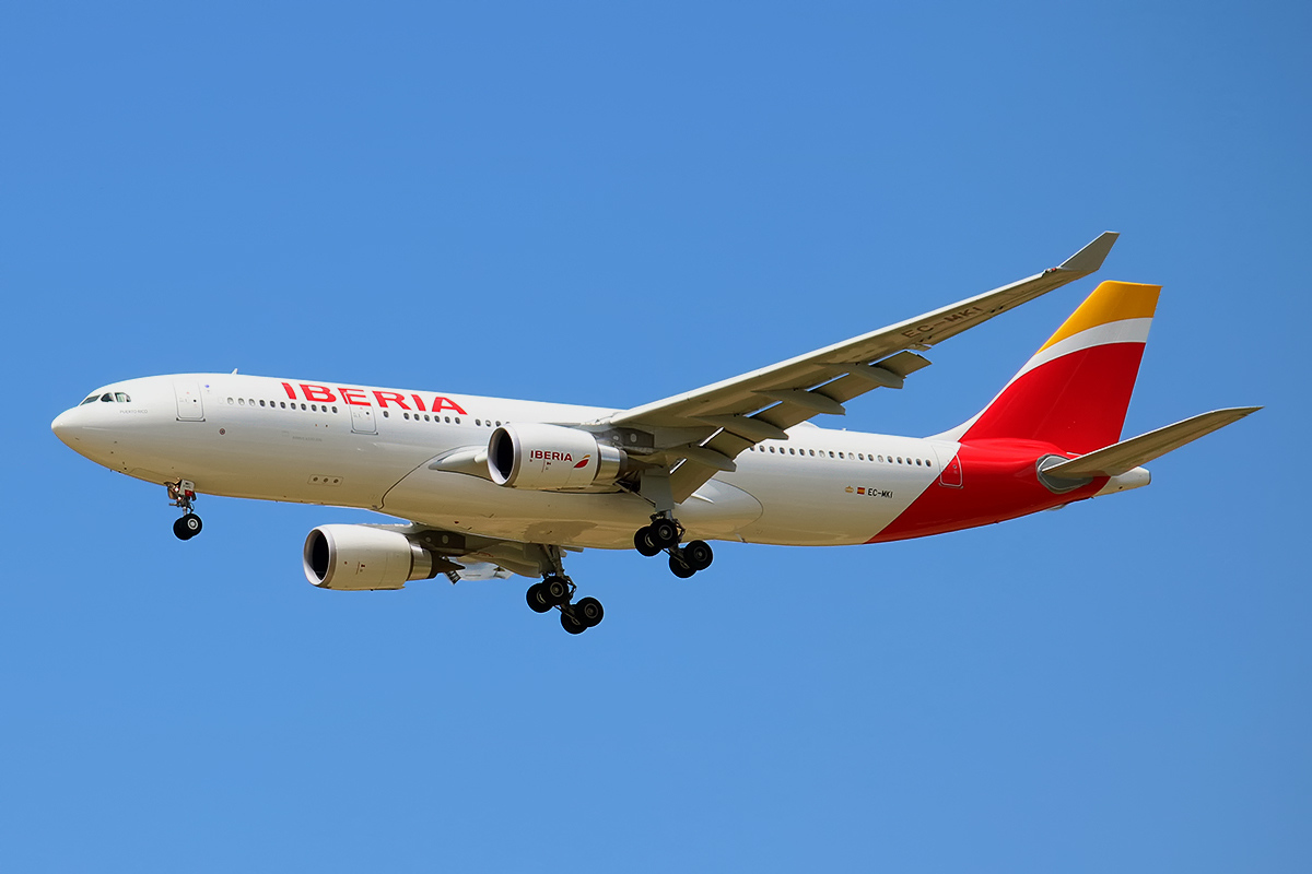 Aircraft: Airbus A330-202 Airline: Iberia Serial #: 1719